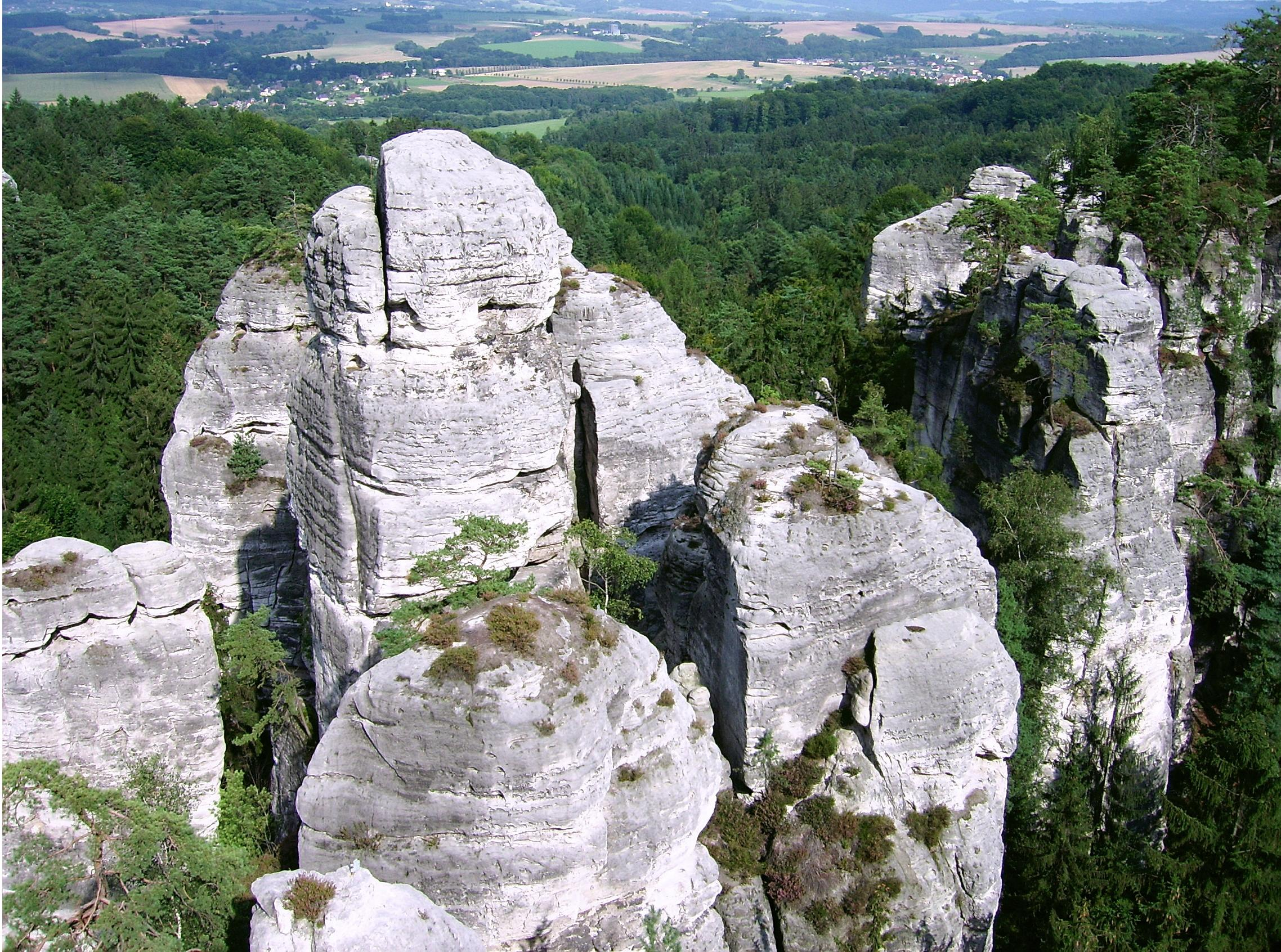 Sfinga, Skalni mesto, Hruba Skala, CZ